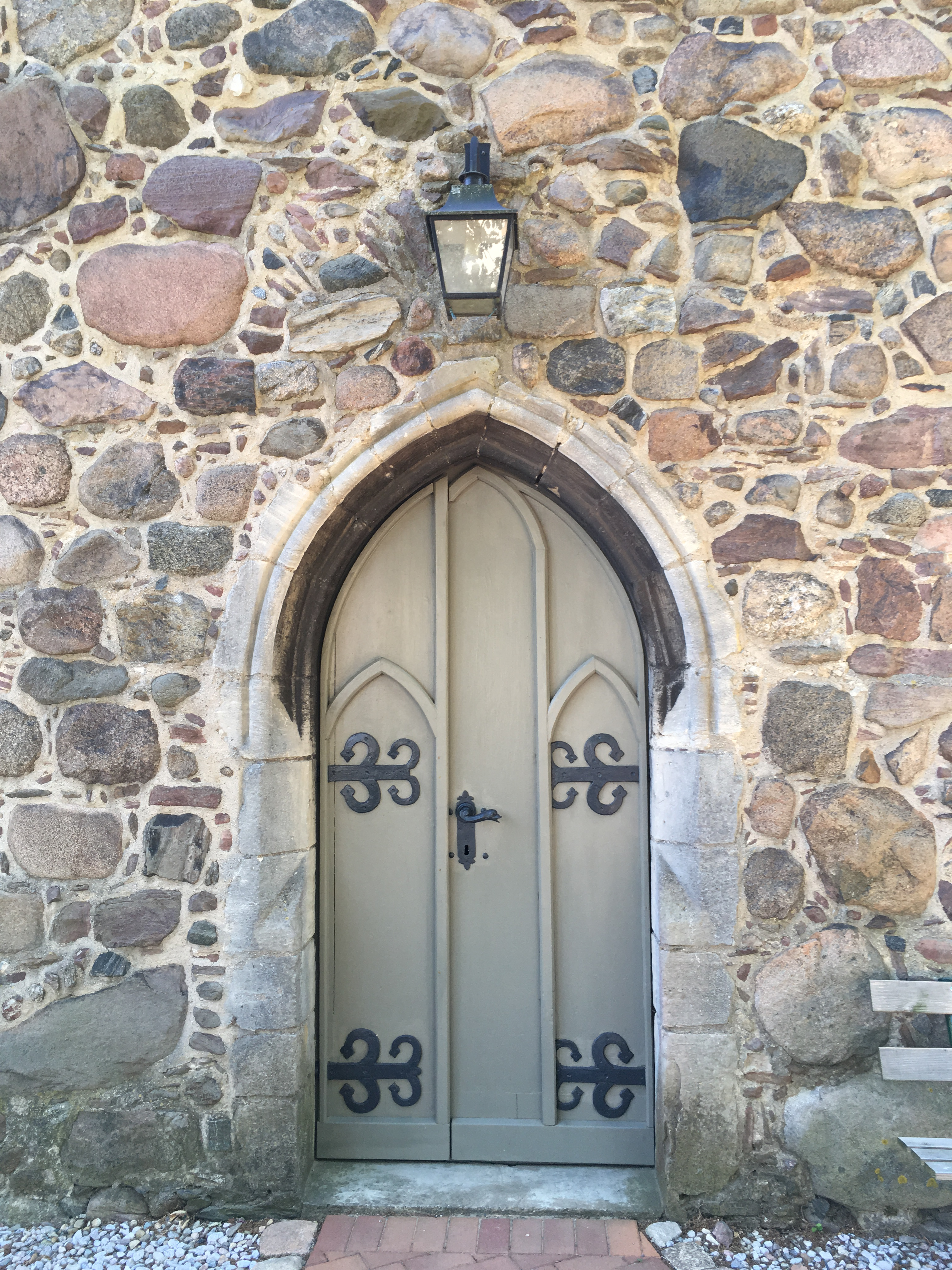 Die Dorfkirche in Krummensee der Stadt Werneuchen entstand im 13. Jahrhundert und wurde im 14./15. Jahrhundert um einen Westturm ergänzt.